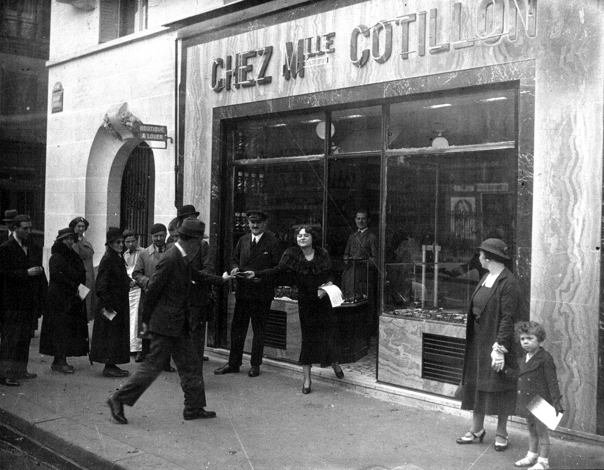 Melle Cotillon devant son bar-restaurant "Chez Mlle Cotillon", 1935